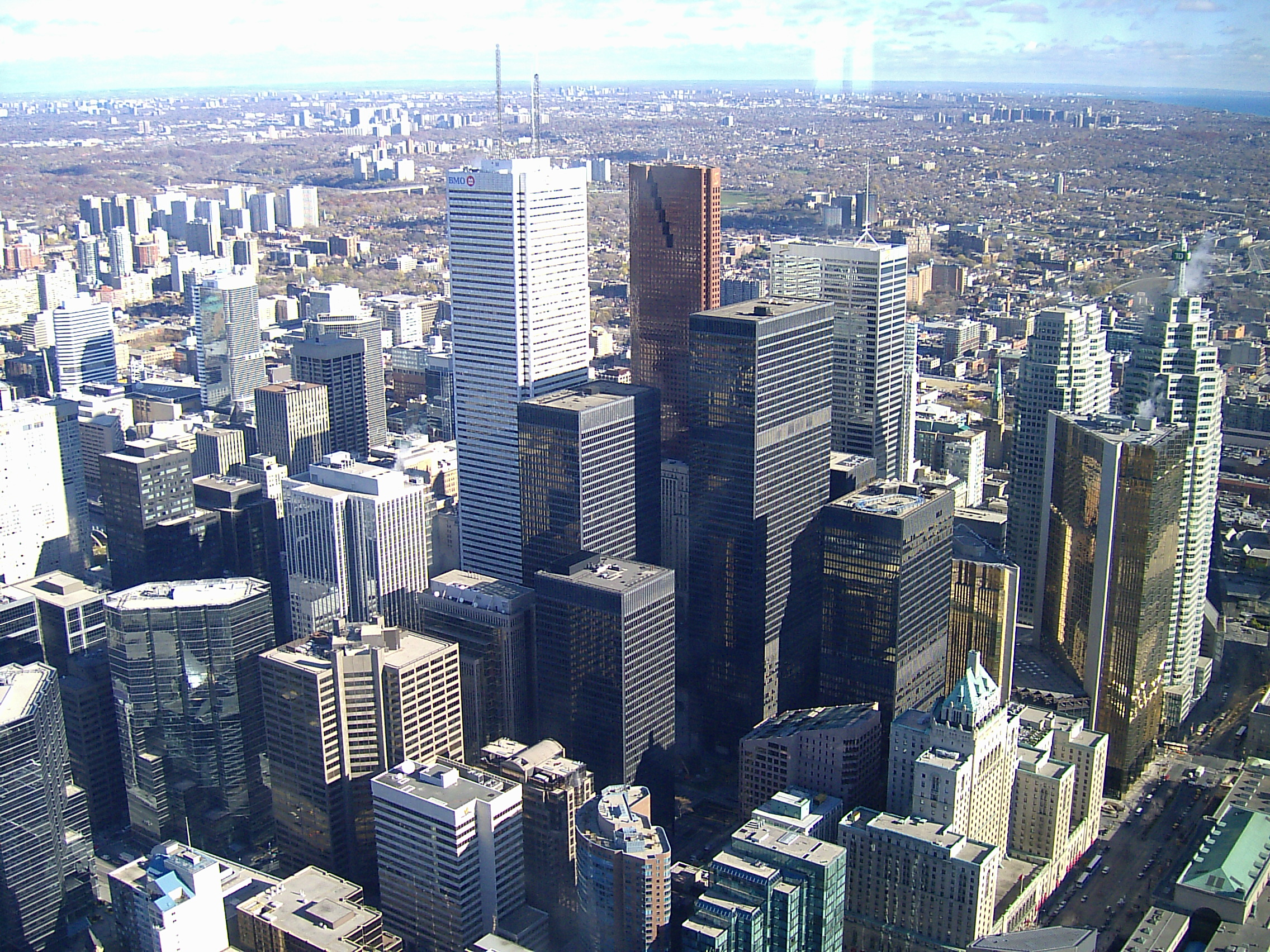 Beschreibung: Blick aus dem CN-Tower auf die Skyline von Downtown Toronto Quelle: selbst fotografiert Fotograf: Andreas Meck Datum: Nov. 2005